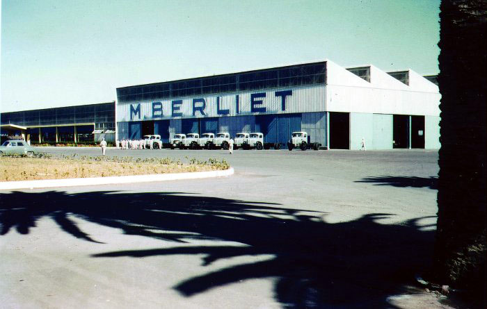 29-06-1959 - Une chaîne de montage à l’usine « Berliet » de Rouiba.